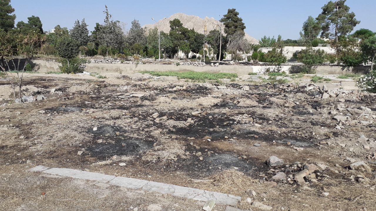 تخریب و نابودی شدید گورستان ابن بابویه